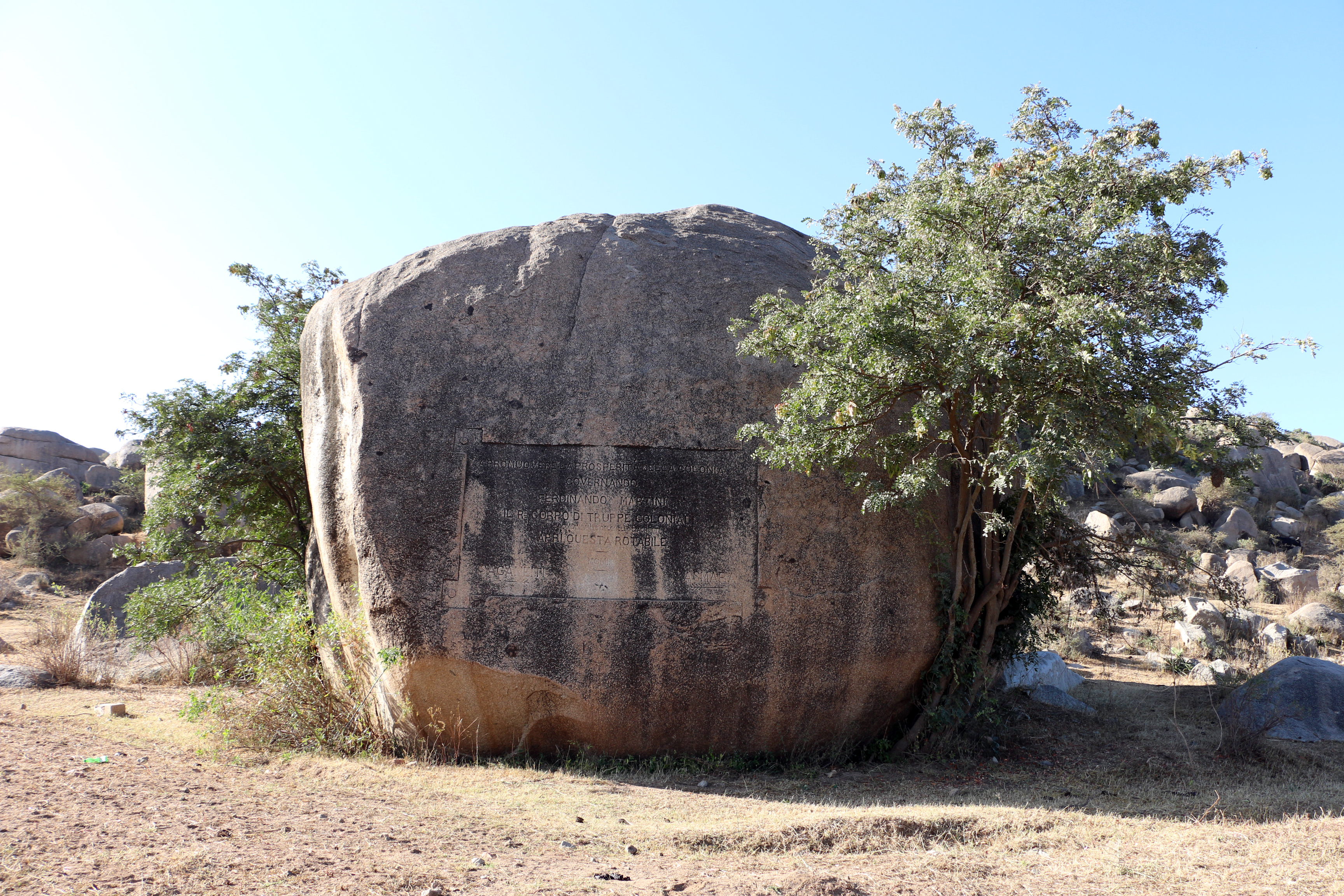 Segheneyti, pietra con iscrizione dell'apertura della strada verso l'etiopia da parte degli italiani 01.JPG